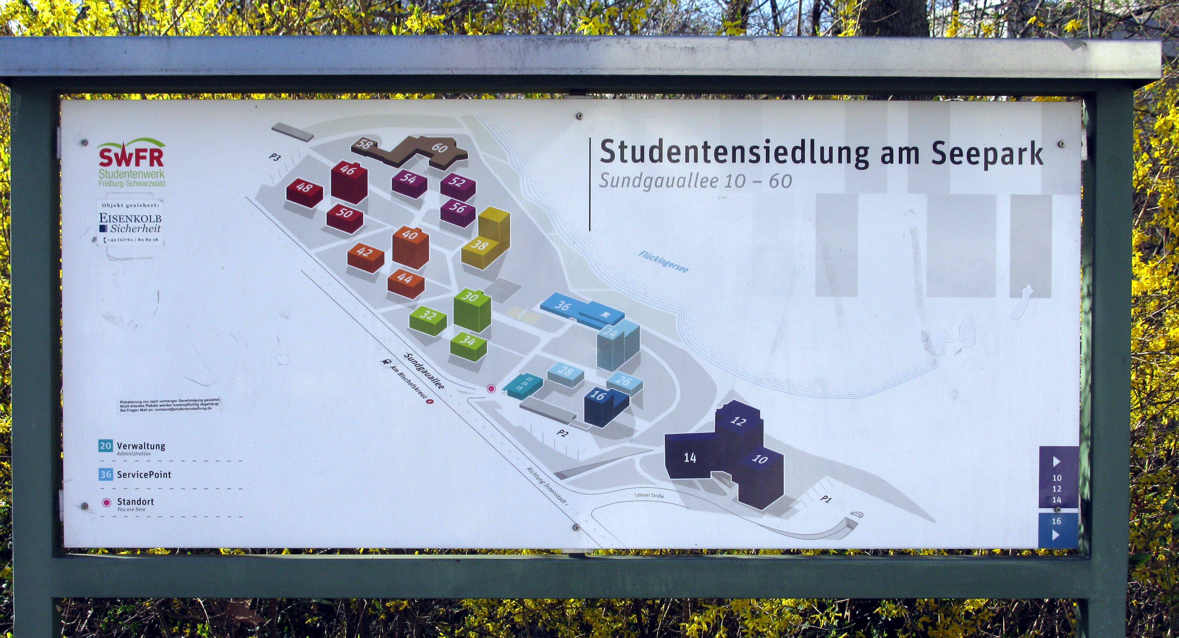 Studentensiedlung am Freiburger Seepark, Tafel